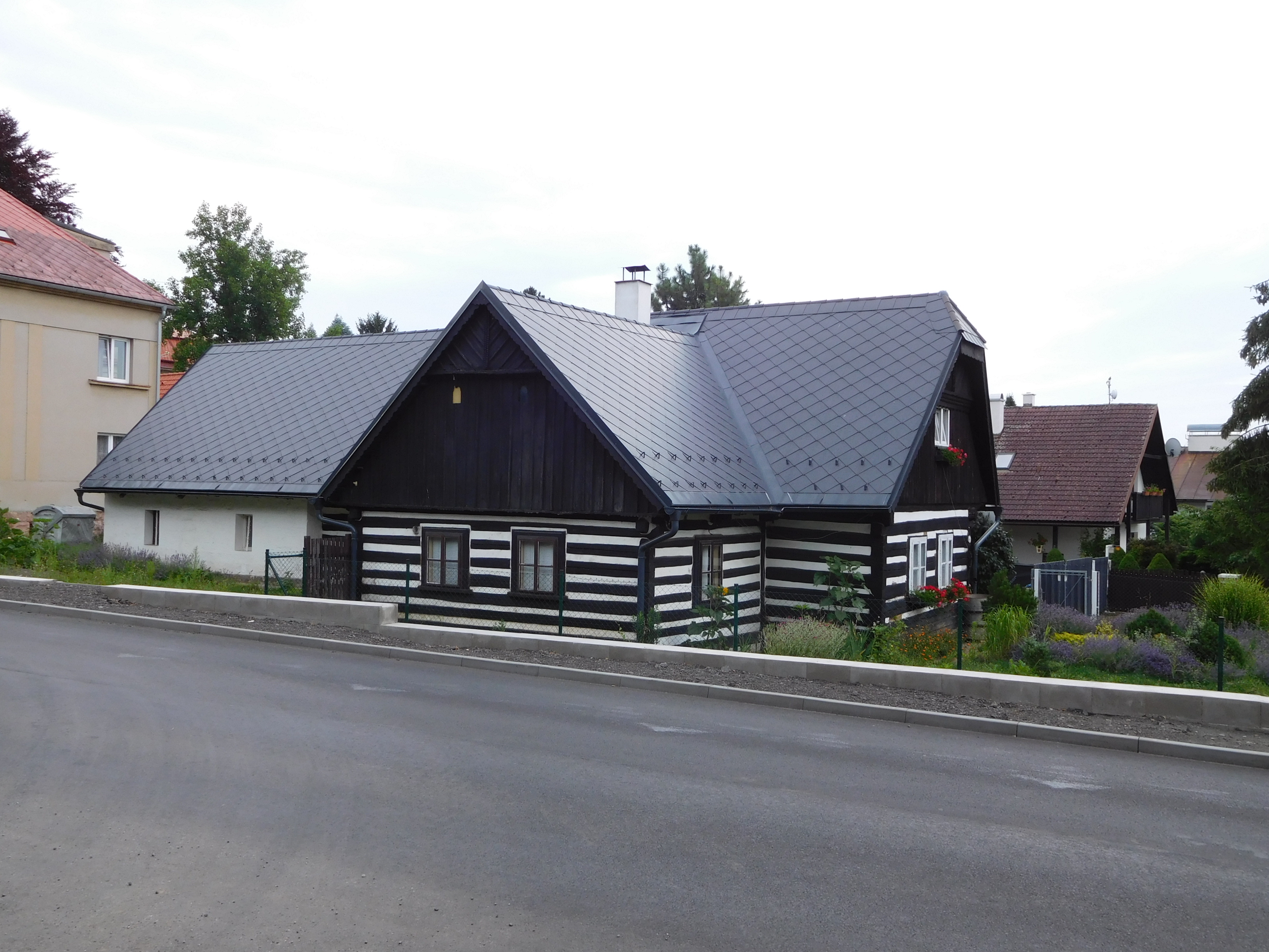 Soudná - dům č.p. 1